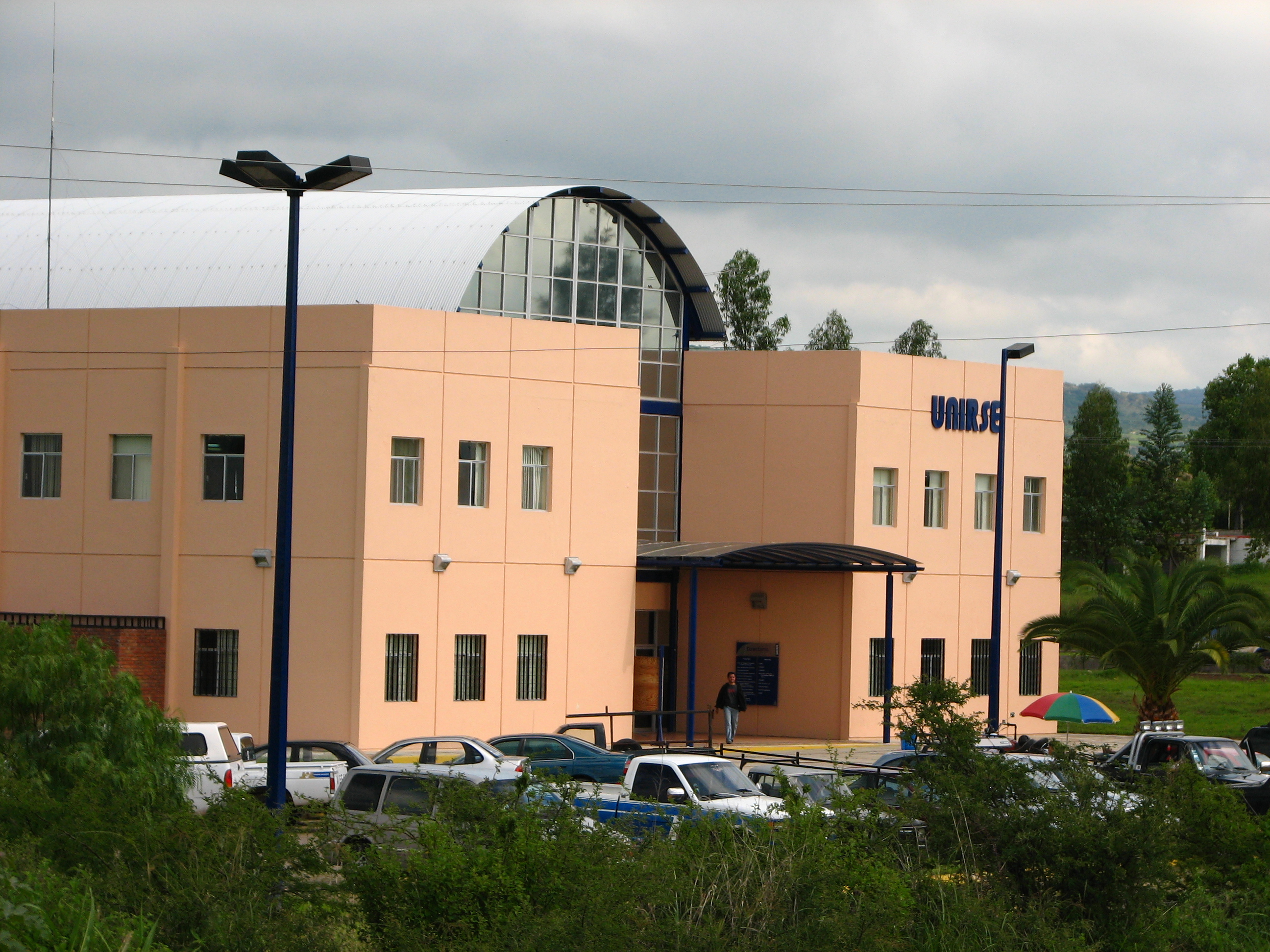 Centro UNIRSE en Colotlán Jalisco, México